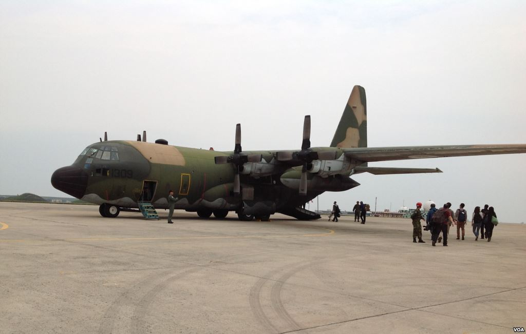 台灣軍隊的C-130運輸機。